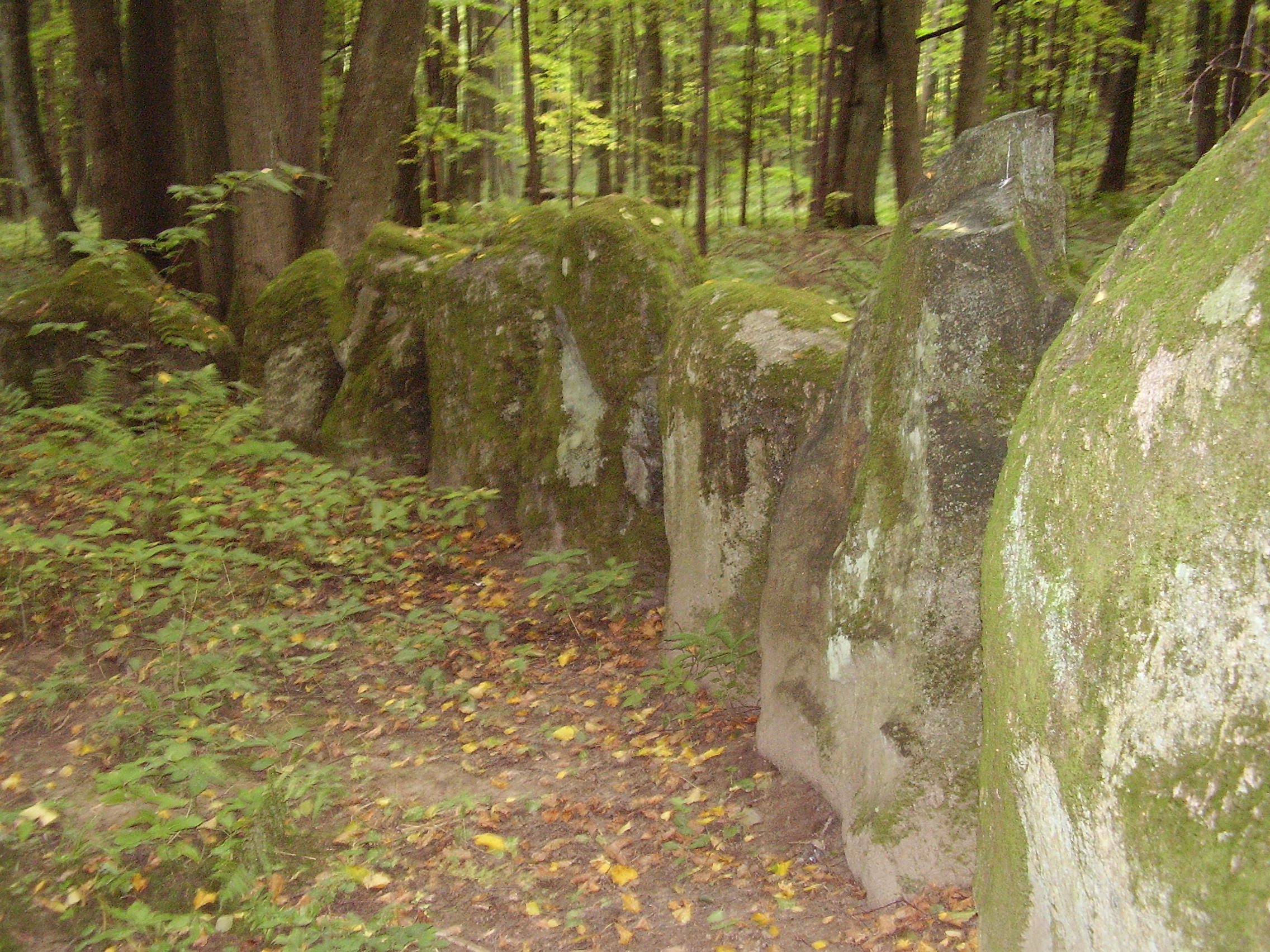 pseudomegalityczny cmantarz rodziny Dohnów (graff zu Dohna)